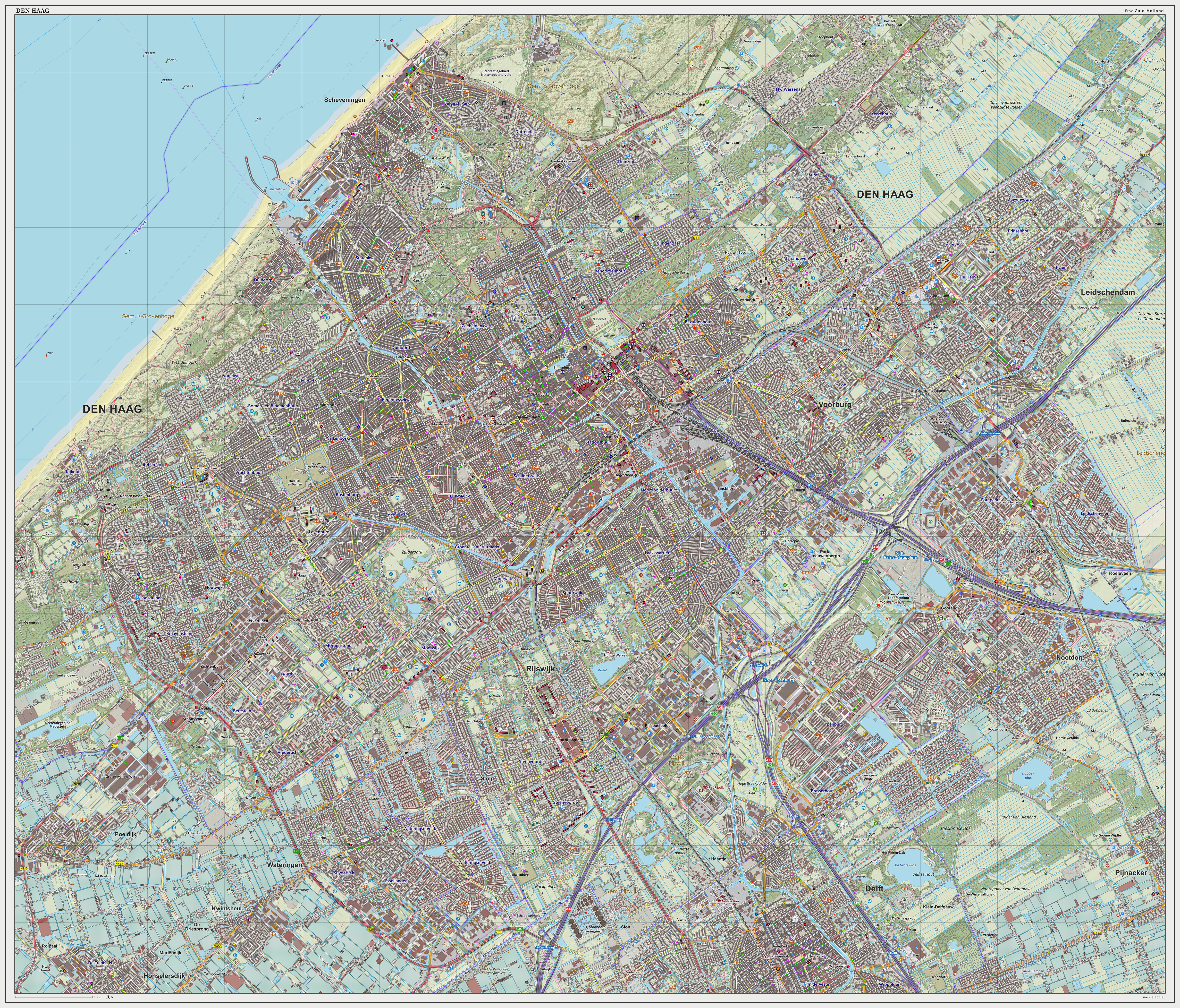 Topografische kaart van Den Haag (woonplaats). Resolutie: 300 pixels/km. Kaartbeeld samengesteld uit de open geodata van de Top10NL en Top25namen (Basisregistratie Topografie, Kadaster), Creative Commons BY licentie. Gebouwvlakken uit open geodata BAG extract. Wegen uit de OpenStreetMap. Reliëfschaduw uit de Actuele Hoogtekaart AHN2. Samenstelling en kleurenschema: Jan-Willem van Aalst, met QGIS2. Zie ook de Legenda.